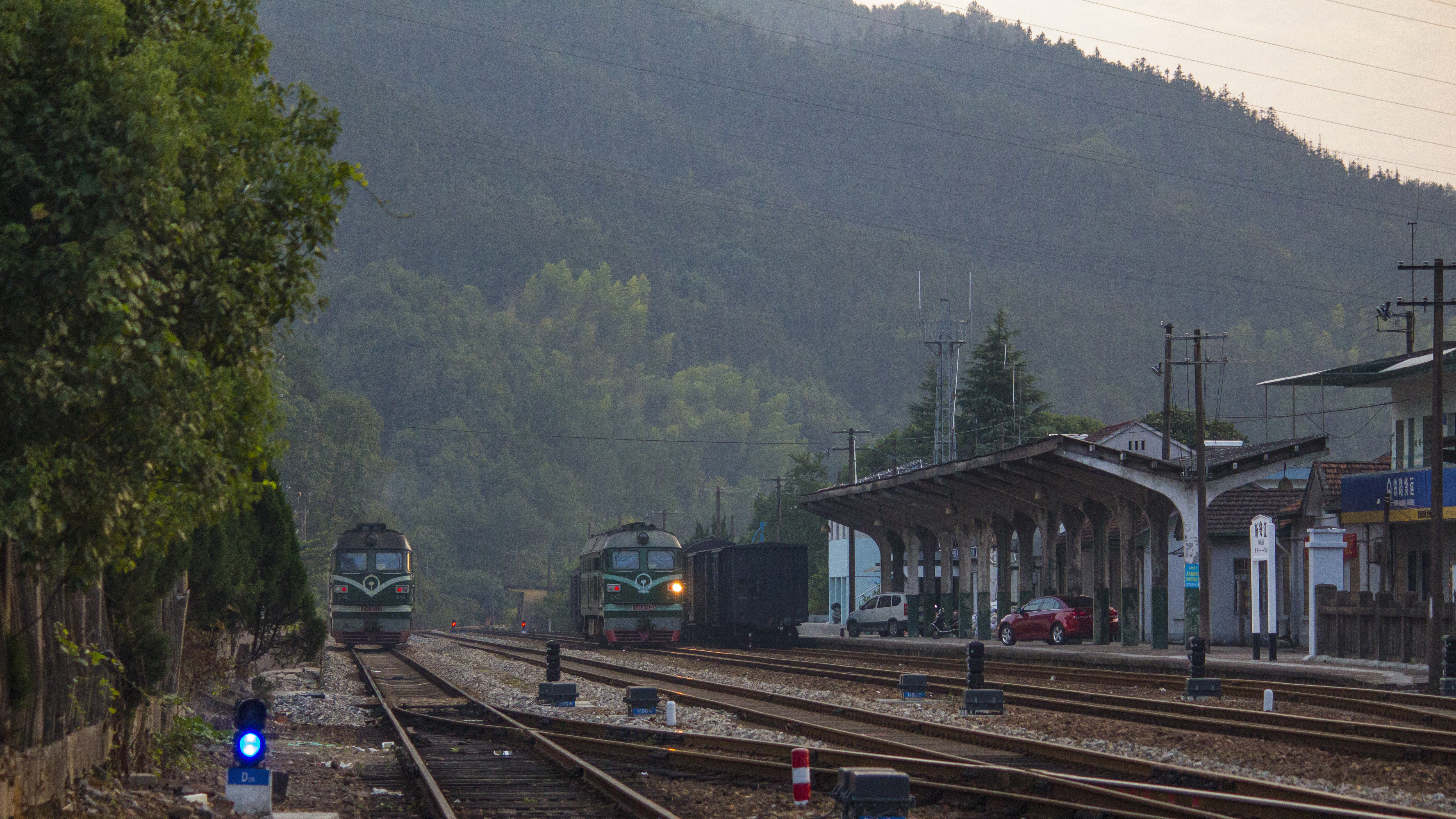 中文（中国大陆）: 雨棚未拆除的新安江站等待摘挂货运列车的DF4B内燃机车